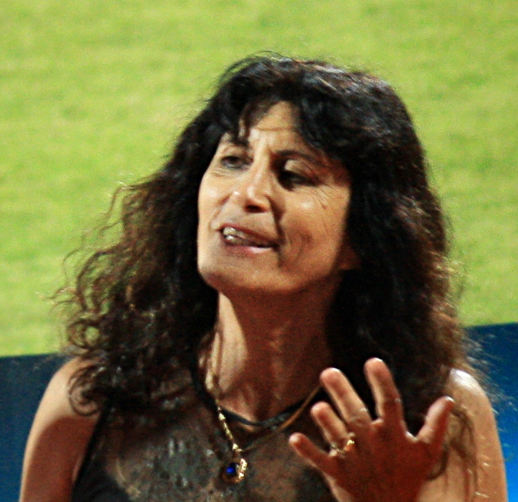 אסתר רוט-שחמורוב בתחרות הלילה של איגוד האתלטיקה בישראל, "אצטדיון האתלטיקה ראשון לציון", 29 ביולי 2013.